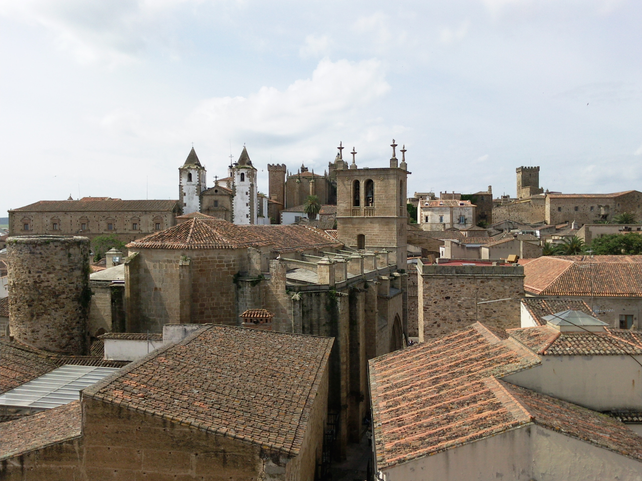 Concatedral de Santa María de Cáceres